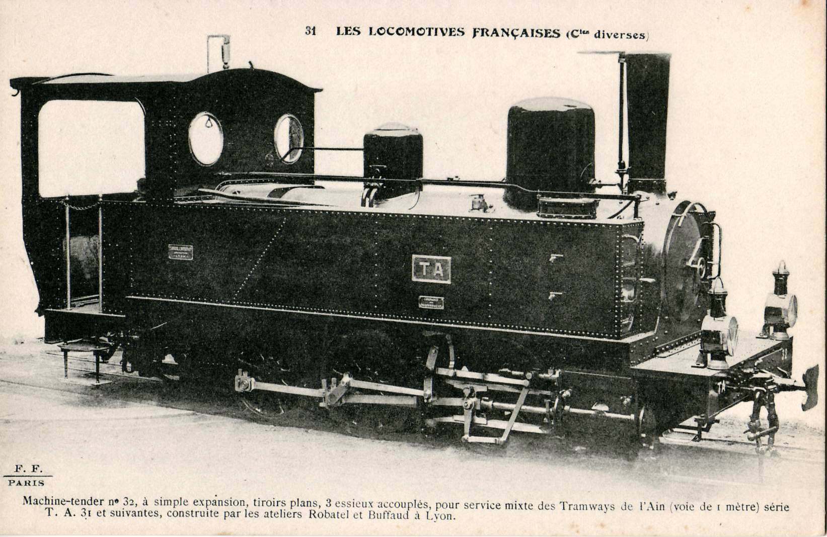 Carte postale ancienne éditée par FF à Paris, collection Les locomotives françaises (compagnies diverses), n°31 : Machine-tender n°32, à simple expansion, tiroirs plans, 3 essieux accouplés, pour le service mixte des Tramways de l'Ain (voie de 1 mètre), série T. A. n°31 et suivantes, construites par les ateliers Robatel et Buffaud à Lyon